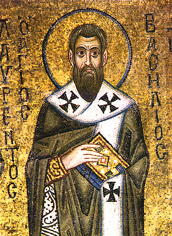 Святий Василій Великий. Мозаїка в Київському соборі Святої Софиї, XI століття.